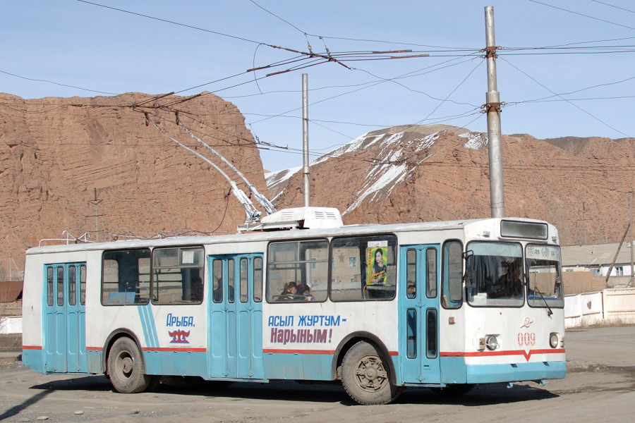 ZiU-9 009 in Naryn